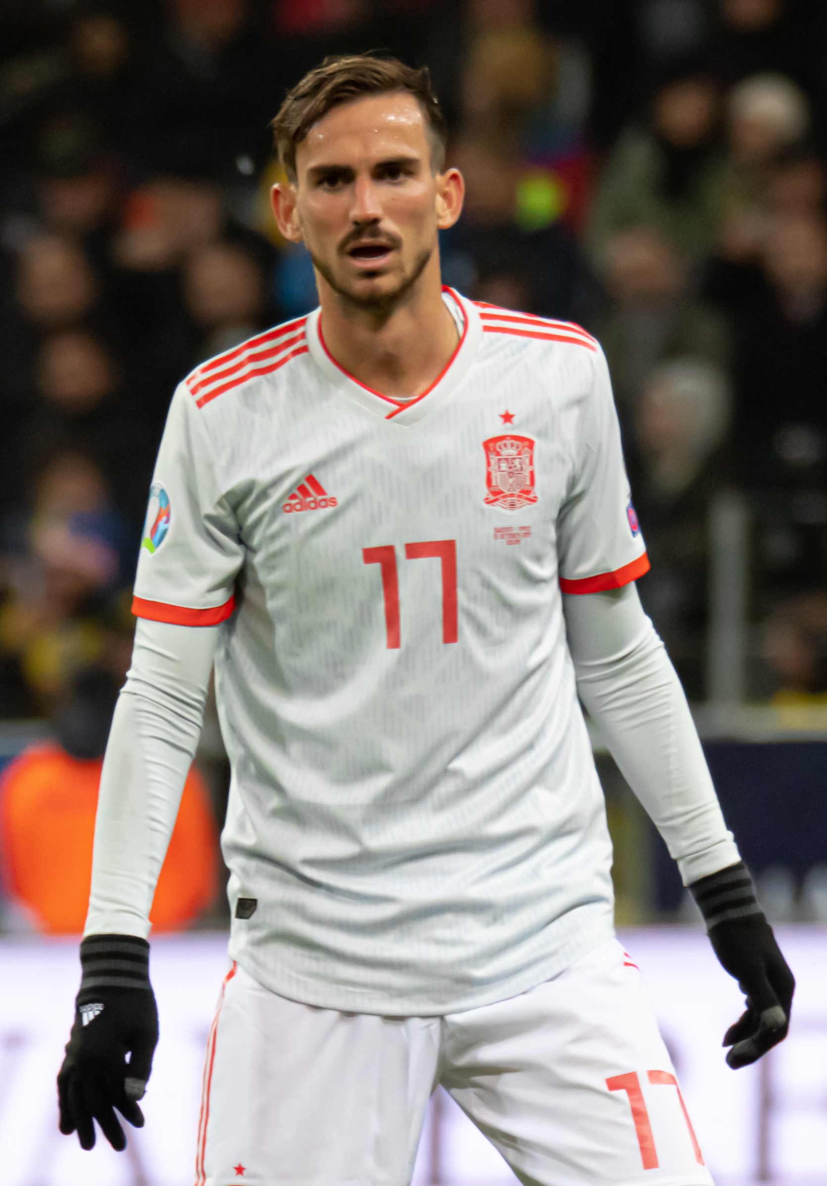 UEFA EURO qualifiers Sweden vs Spain 20191015